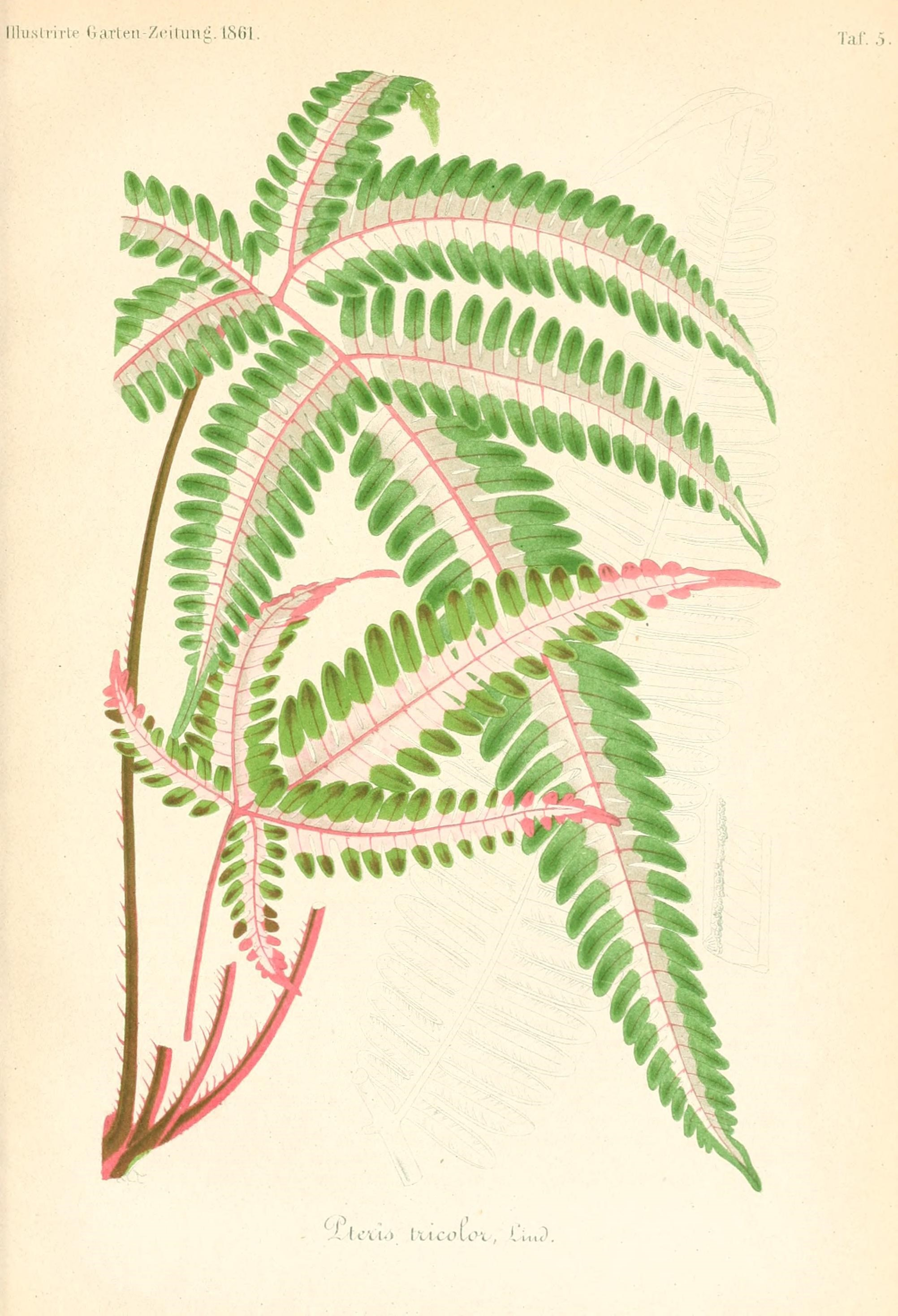 Illu.slniic li.ivlt'ii /rilunu IMil Taf. 5 ( P i'